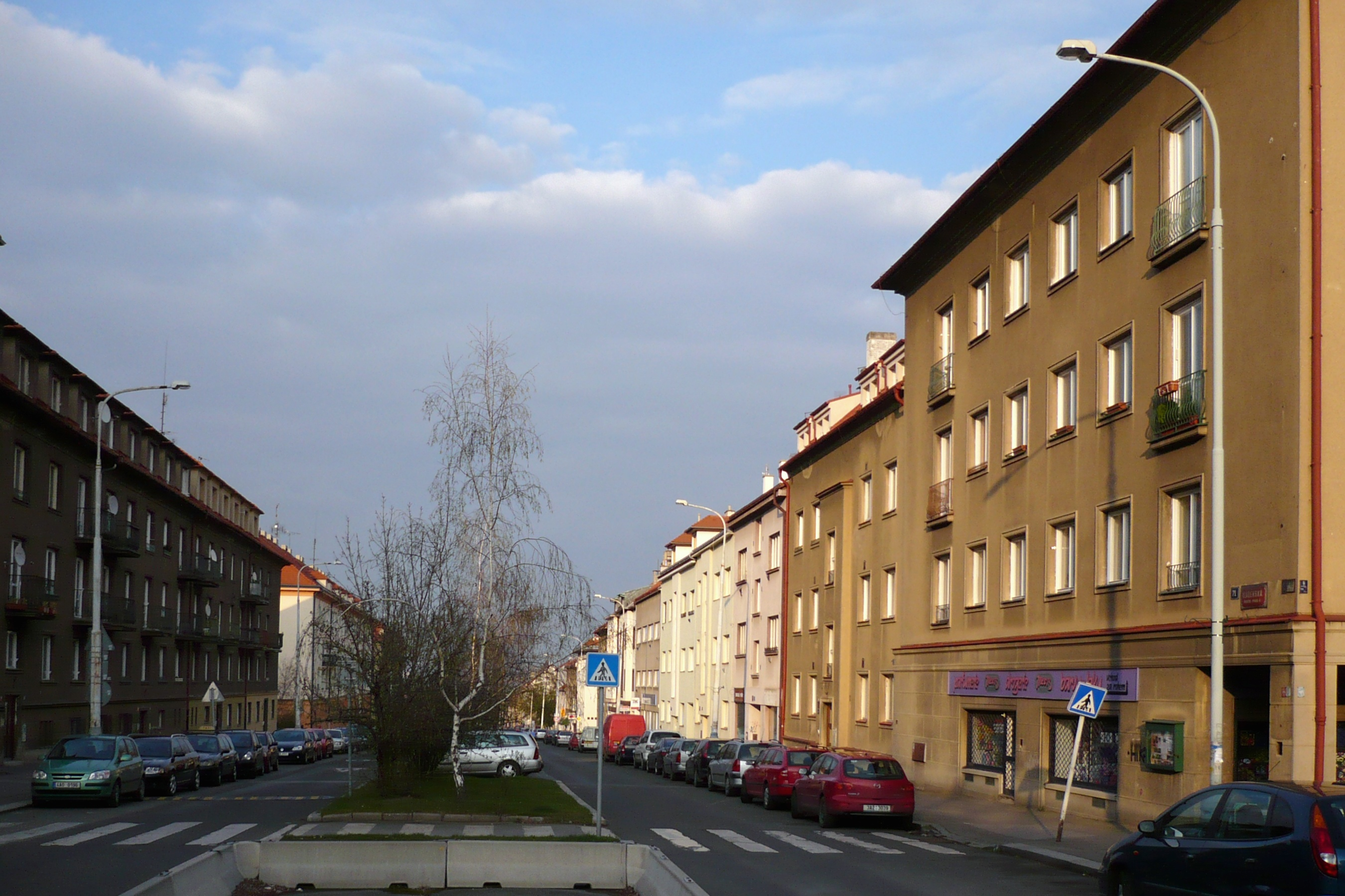 Praha, Vokovice - ulice Kladenská